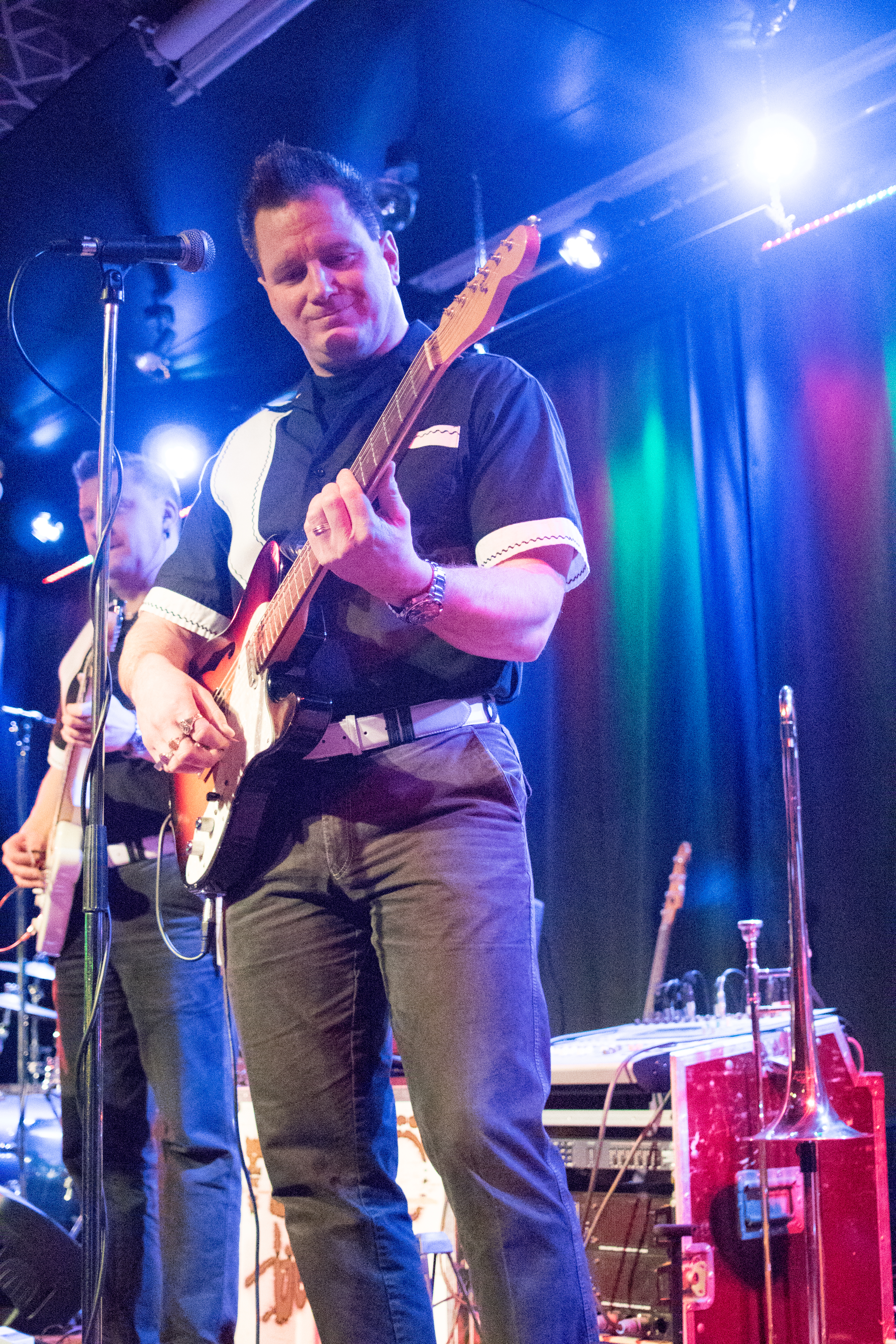 Jere Vilkkinen suomalainen kitaristi